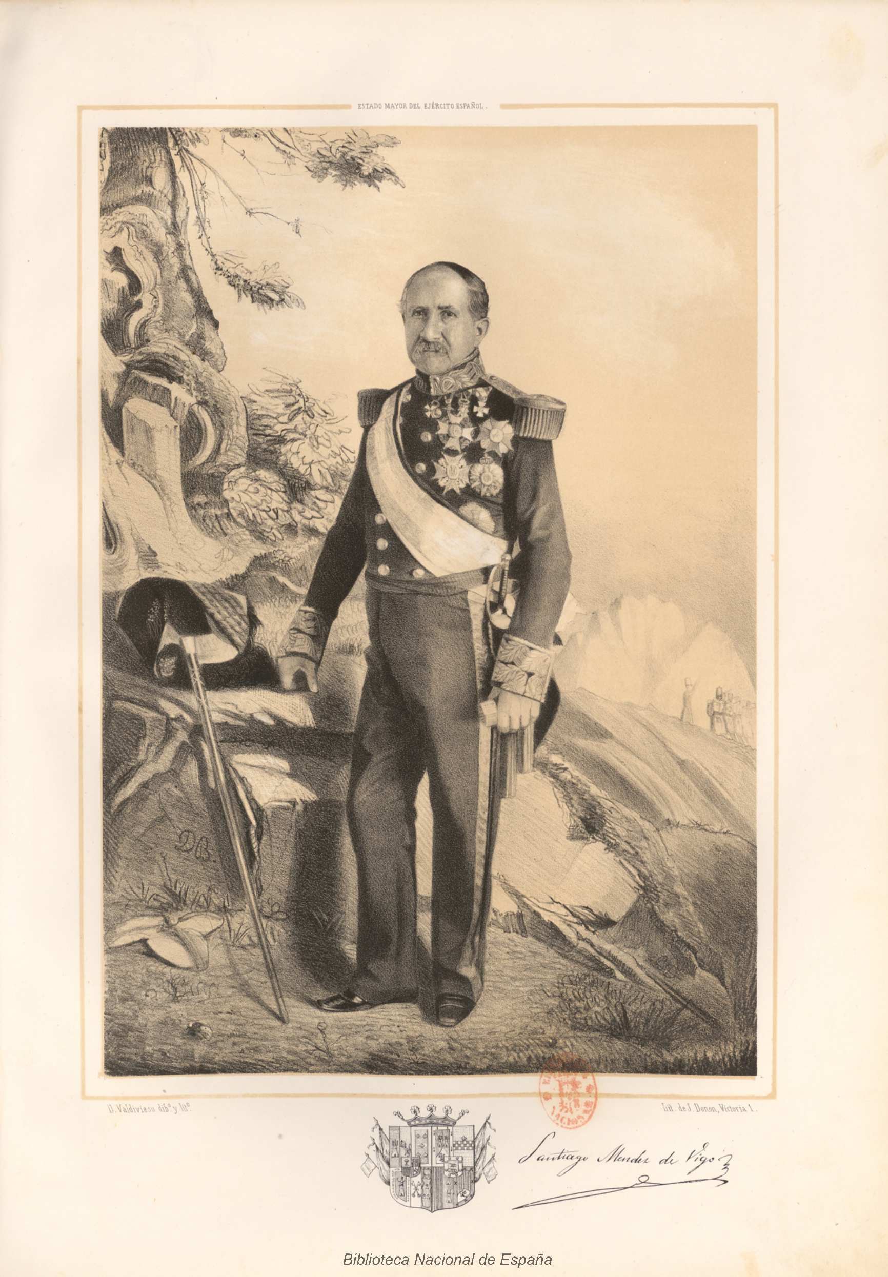 Santiago Méndez de Vigo. Dibujo y litografía de Domingo Valdivieso para "Estado Mayor General del Ejército